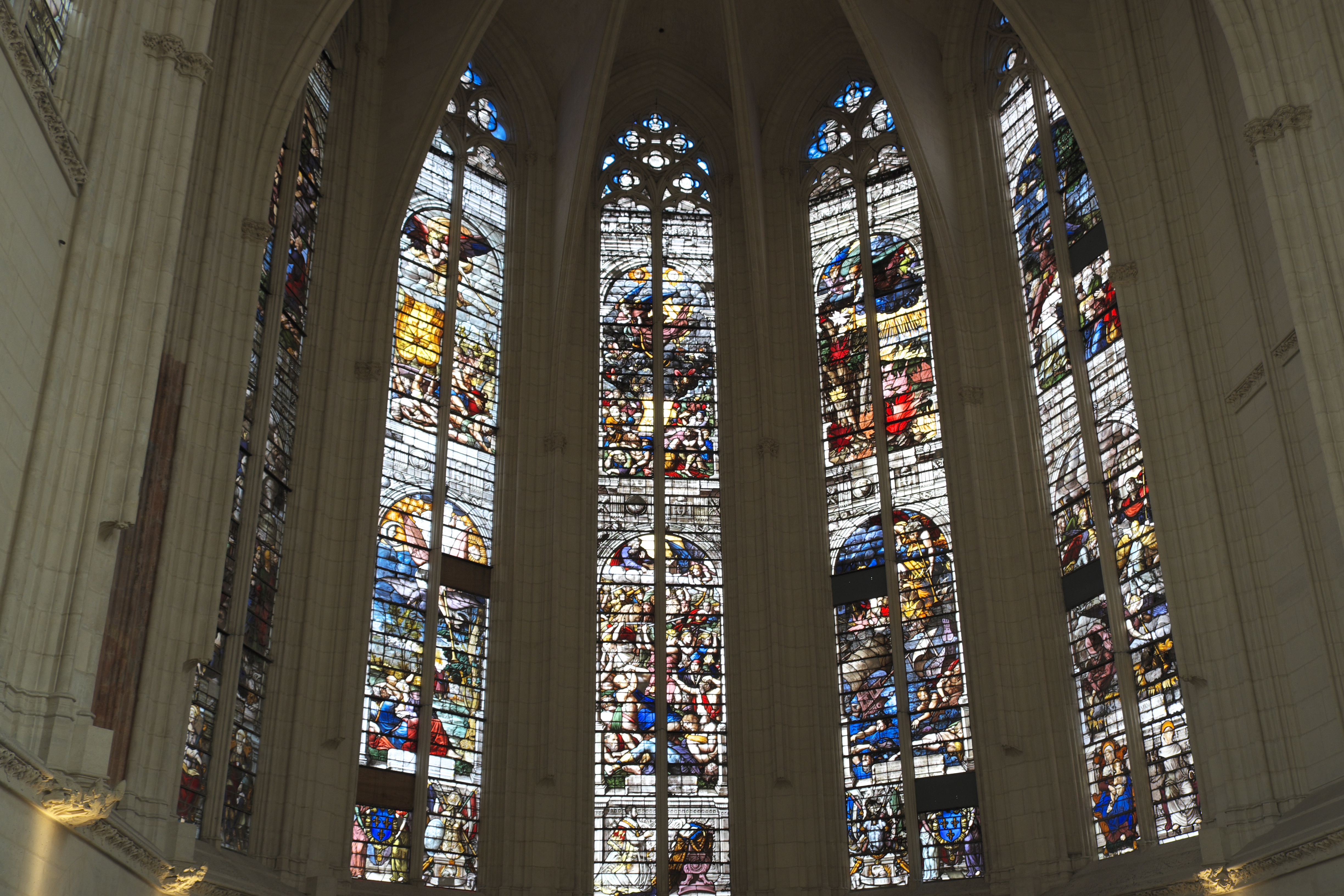 Bleiglasfenster im Chor der Sainte-Chapelle, der Palastkapelle des Schlosses von Vincennes im Département Val-de-Marne (Region Île-de-France/Frankreich), aus dem 16. Jahrhundert von Nicolas Beaurain